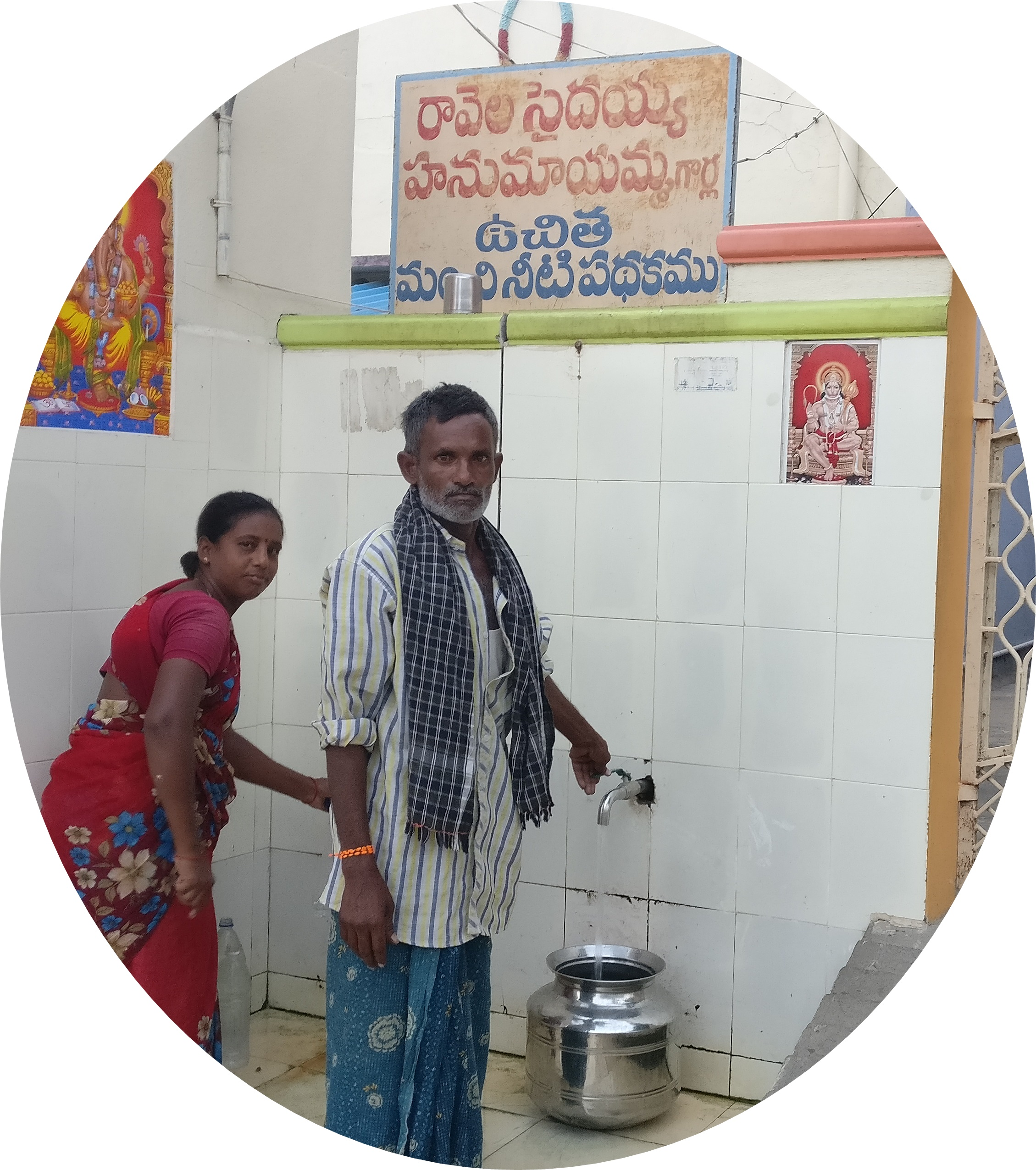 కండ్లగుంట గ్రామ బొడ్డురాయి ఎదురుగా తమ స్వంత స్థలంలో దాత రావెల సత్యనారాయణ అందరికి మంచి ఆరోగ్యం మంచినీళ్లతోనే అనే భావంతో శుద్ధమైన మంచినీళ్ళను తల్లిదండ్రుల జ్ఞాపకార్ధం "రావెల సైదయ్య, హనుమాయమ్మ గార్ల ఉచిత మంచినీటి పథకం"ను, తొమ్మిది లక్షల రూపాయల వ్యయంతో శుద్ధజల కేంద్రాన్ని ఏర్పాటుచేసి ఊరందరి దాహార్తిని తీరుస్తూ, ప్రతినెల దానికయ్యే ఖర్చులను మరియు వేతనాలను సమకూరుస్తున్నారు.